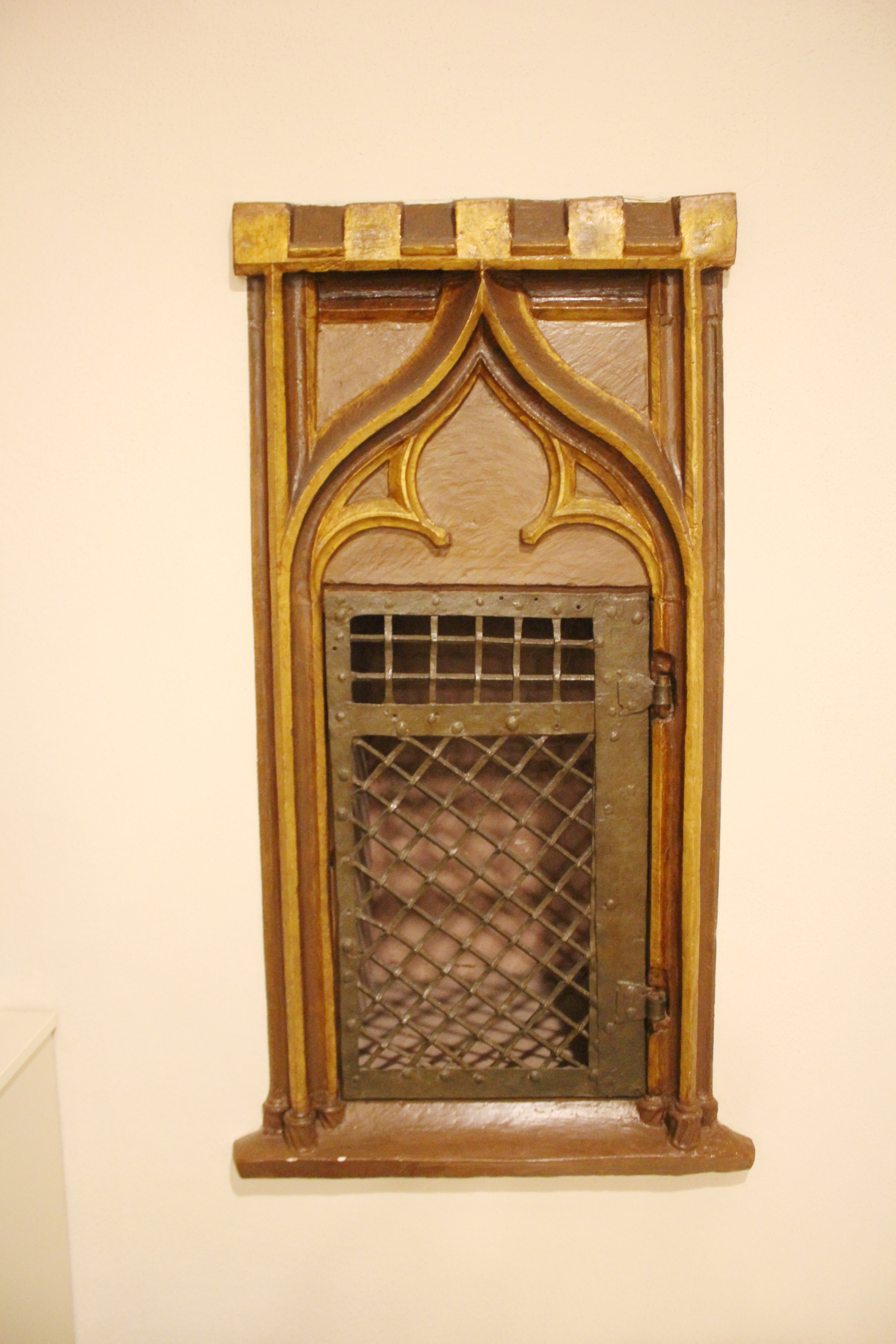 Evangelische Kirche Münchholzhausen, Wetzlar, Lahn-Dill-Kreis, Hessen, Deutschland